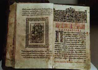 Книга "Апостол". 1632. Типография Спиридона Соболя. Кутеинская типография.